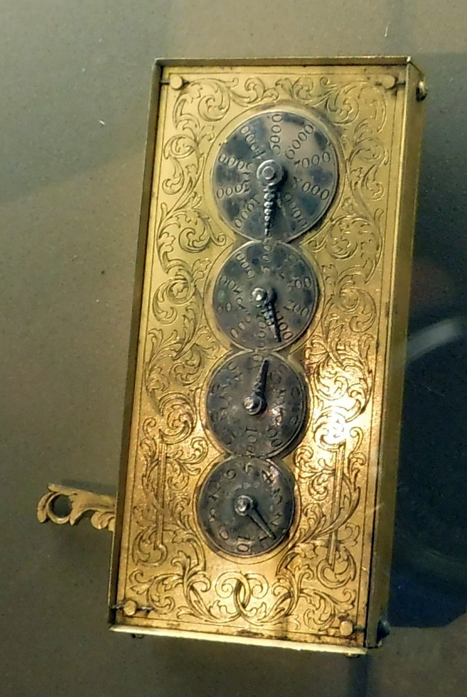 Schrittzähler. Augsburg um 1730. Messing, vergoldet. Johann Willebrand. Die Schrittzählung erfolgte über eine Schnur, die am Bein des Laufenden befestigt wurde und den Hebel an der linken Seite betätigte.